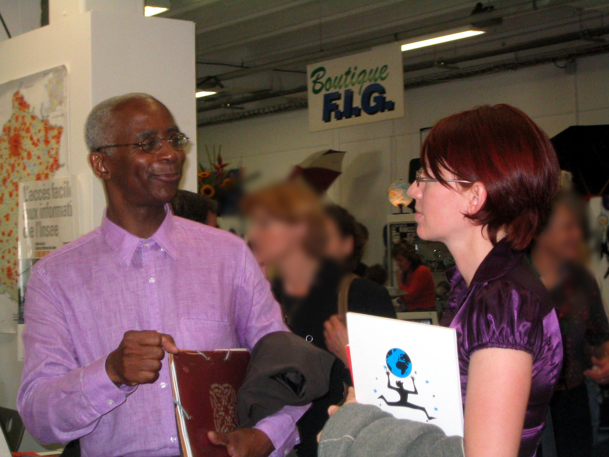 L'écrivain guadeloupéen Daniel Maximin au Salon du Livre Amerigo Vespucci lors du 17ème Festival international de géographie de Saint-Dié-des-Vosges (2006)